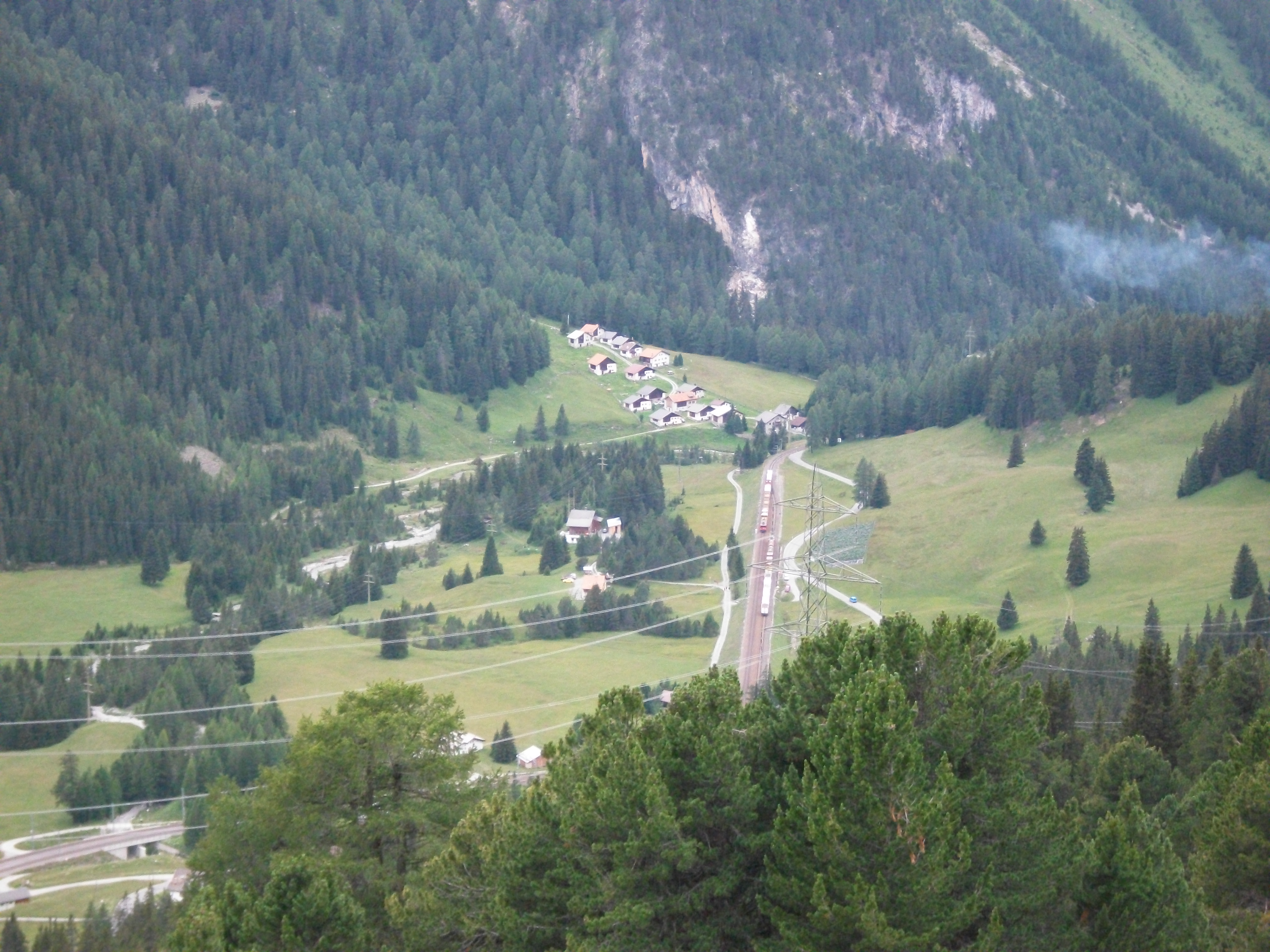 Preda und Naz mit Albulapassstrasse und Bahnlinie